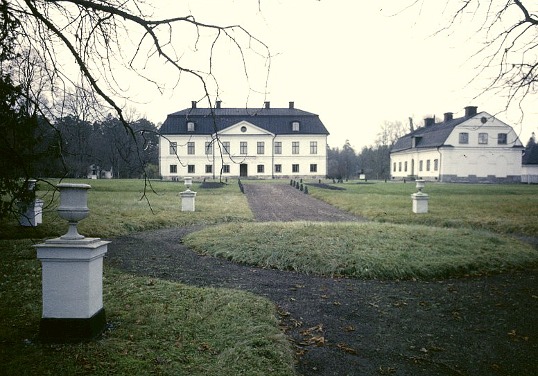 Hargs bruksherrgård